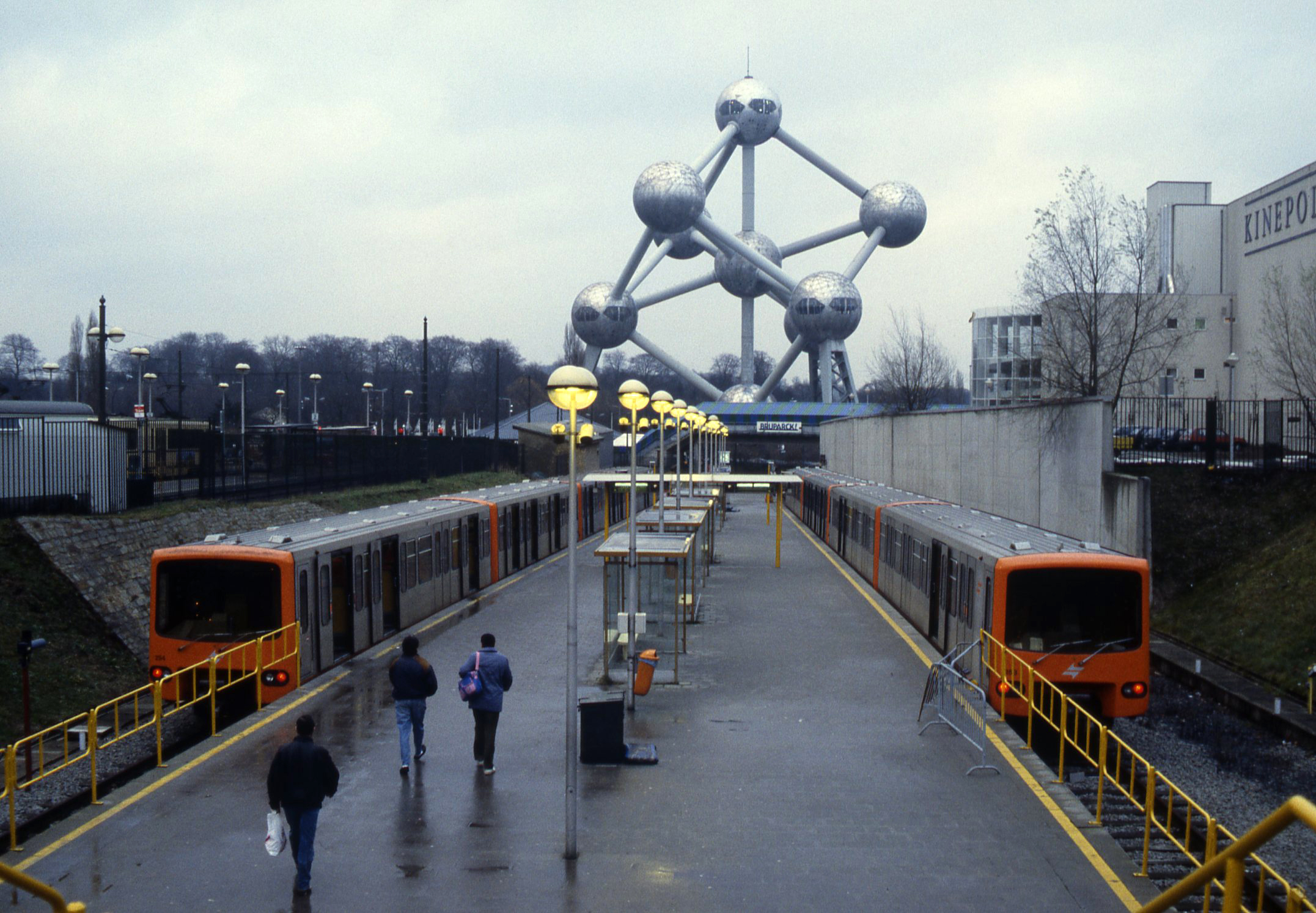 Het metrostation Heizel toen nog in de open lucht met de Atomium op de achtergrond.